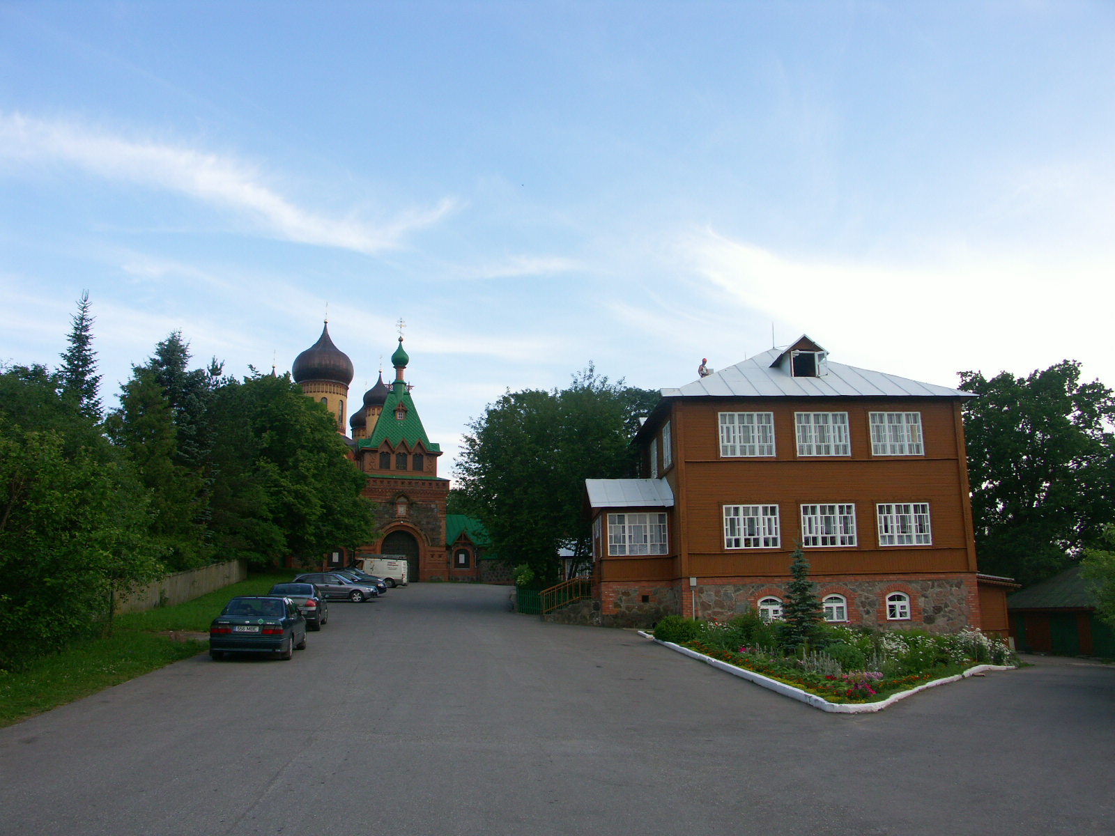 Kuremäe kloostri võõrastemaja, 19.saj.